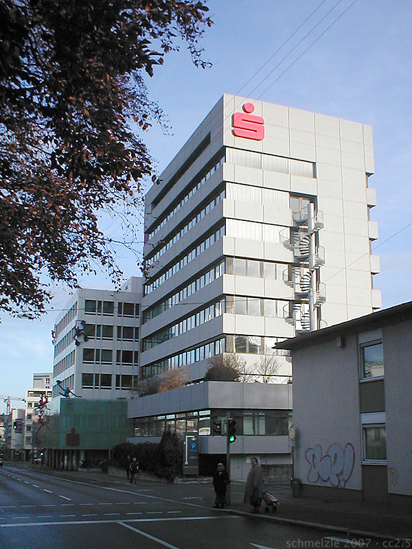 Ehemaliges Hochhaus des Landratsamtes, heute Teil des Gebäudekomplexes der Kreissparkasse Heilbronn an der Allee in Heilbronn